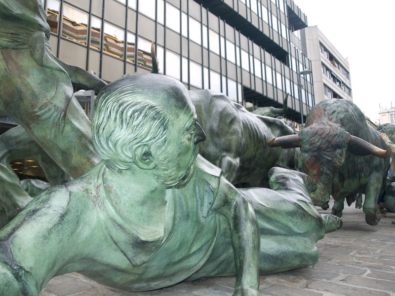 Espectacular grupo escultórico dedicado al encierro en PamplonaPamplona, España, por Rafael Huerta.